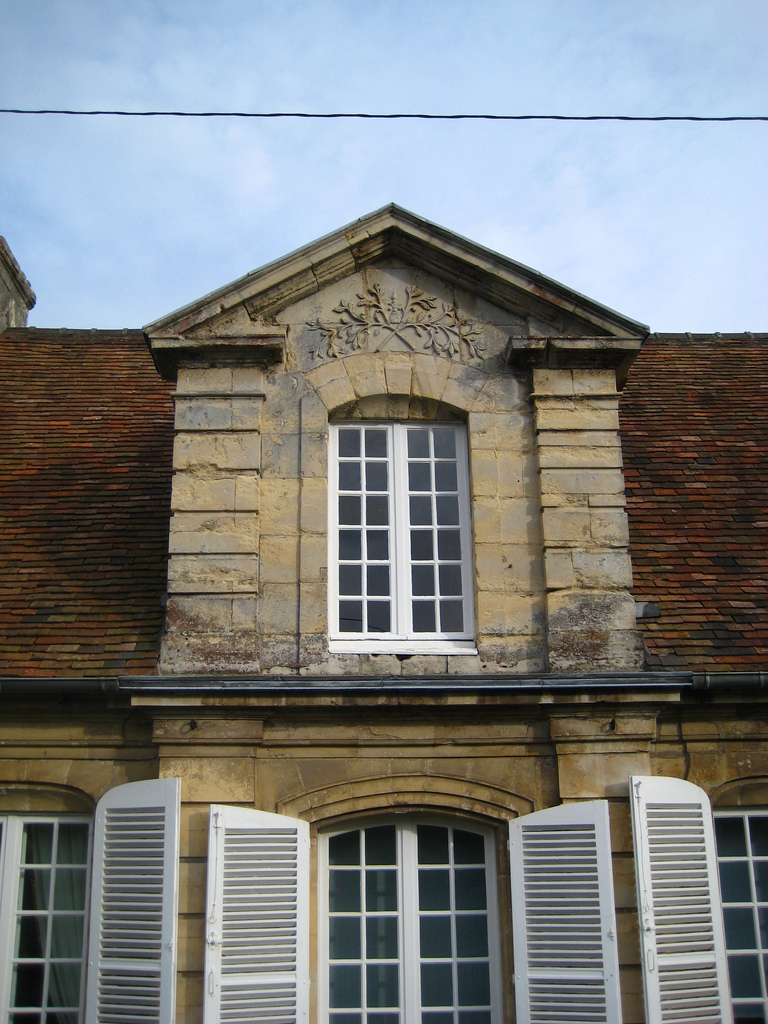 Fronton de l'ancienne maison des seigneurs de Venoix à Caen